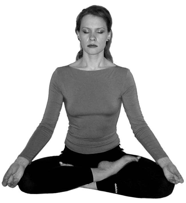 Классическое исполнение падмасаны